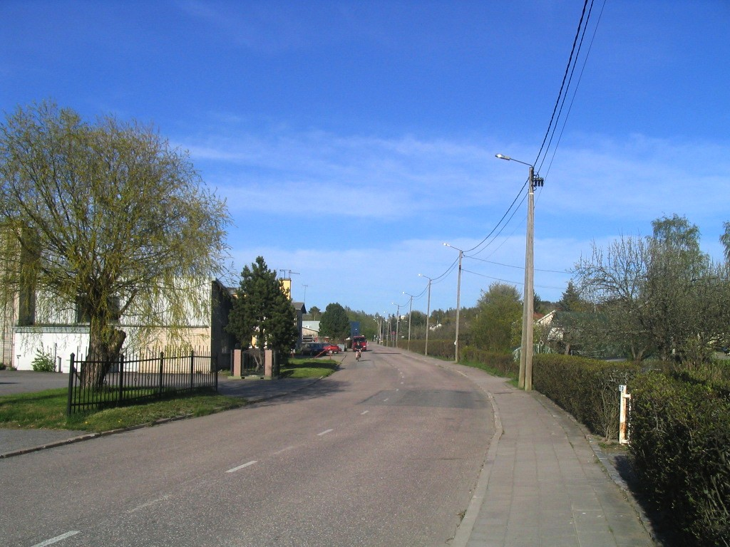 Puistomäenkatu, Turussa sijaitsevan Puistomäen kaupunginosan pääkatu.